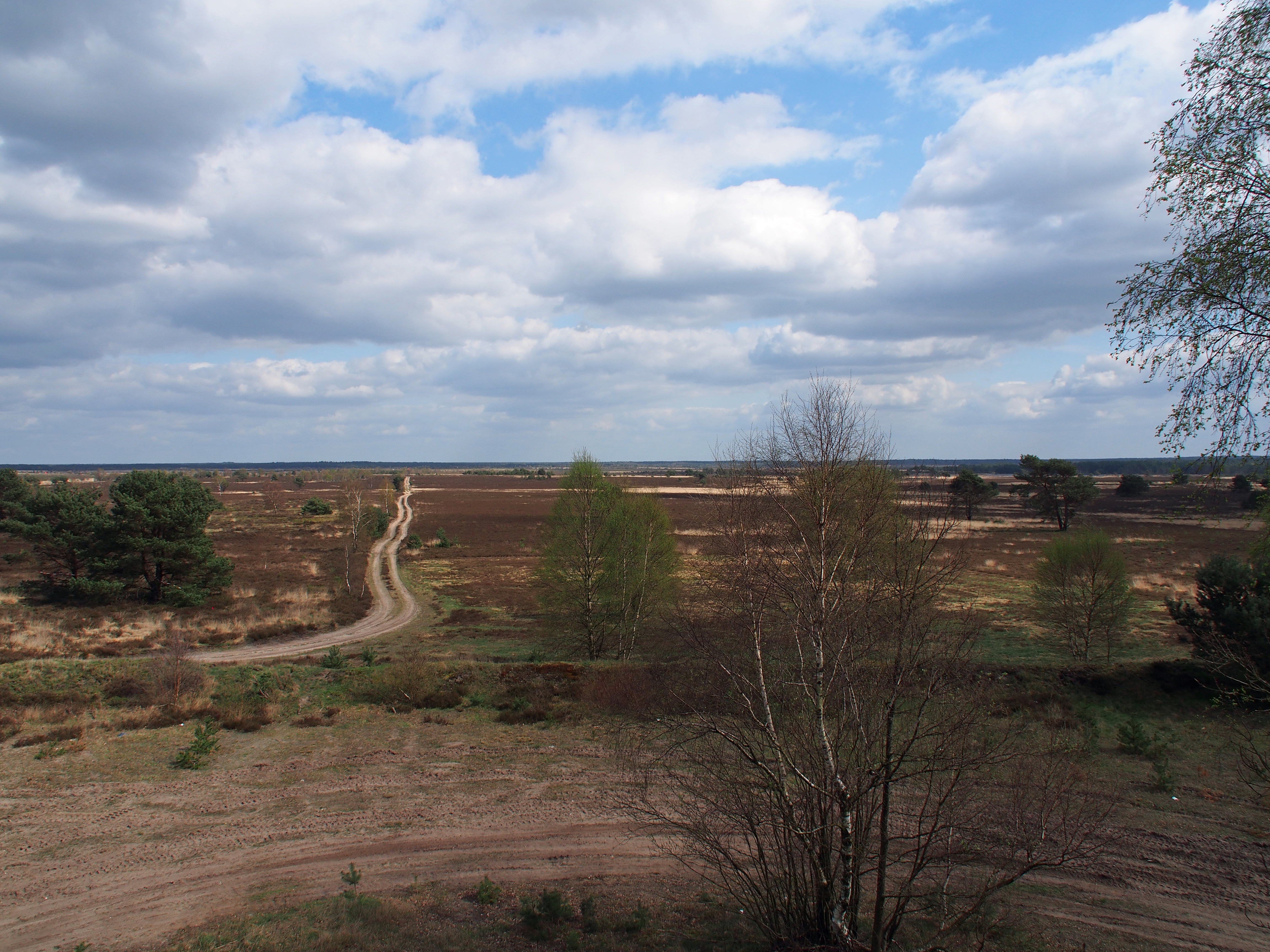 Übungsgelände Truppenübungsplatz Munster-Süd (Blick vom "Hindenburg-Bunker")